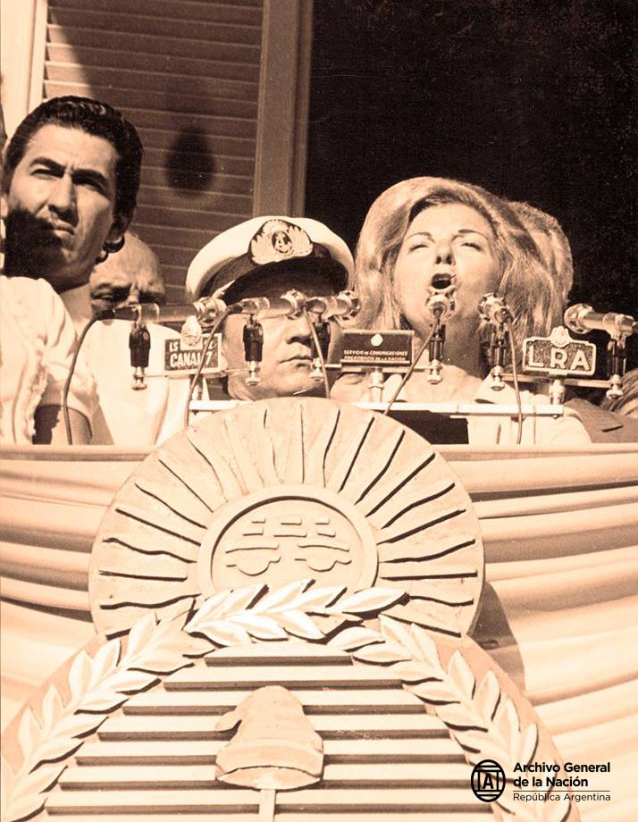 María Estela Martínez de Perón durante el acto de su regreso a la Casa Rosada luego de una licencia de un mes. AGN_DDF/Inv: 73429